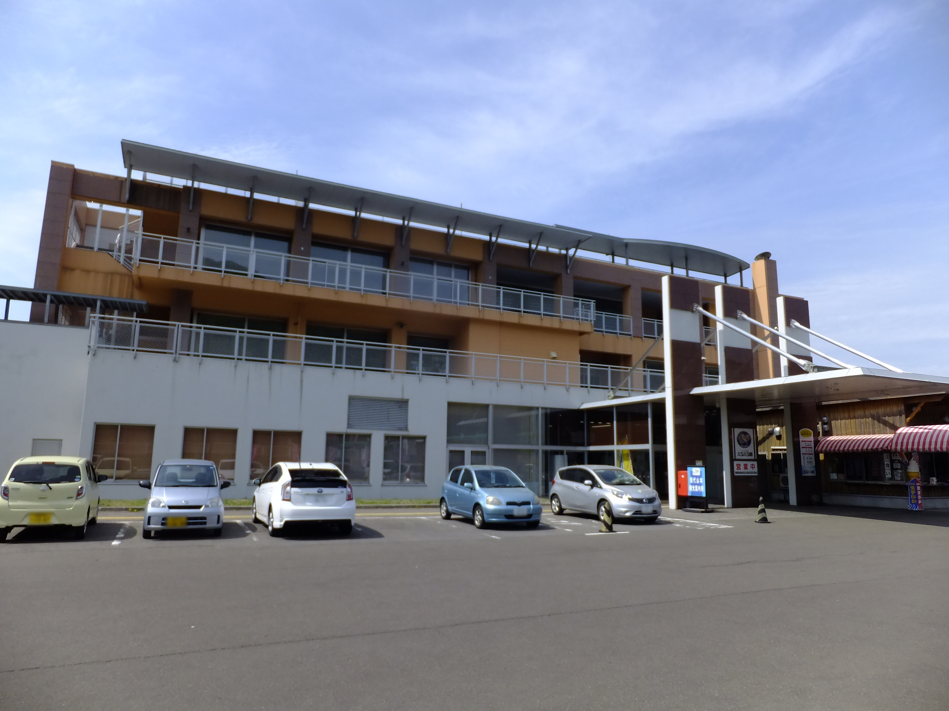 八森いさりび温泉・ハタハタ館（秋田県山本郡八峰町）